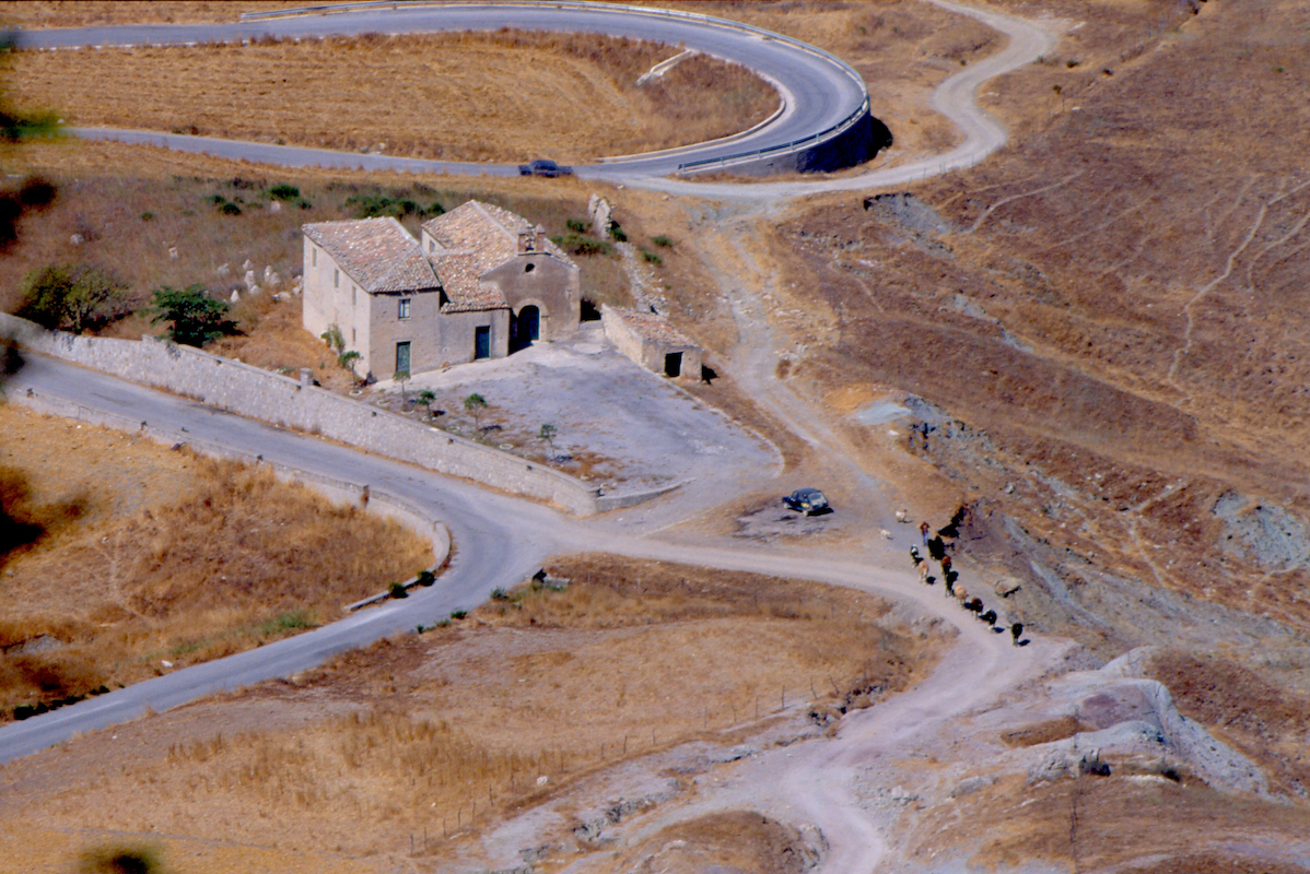 Eremo di san Gandolfo, Polizzi Generosa, provincia di Palermo, Italy